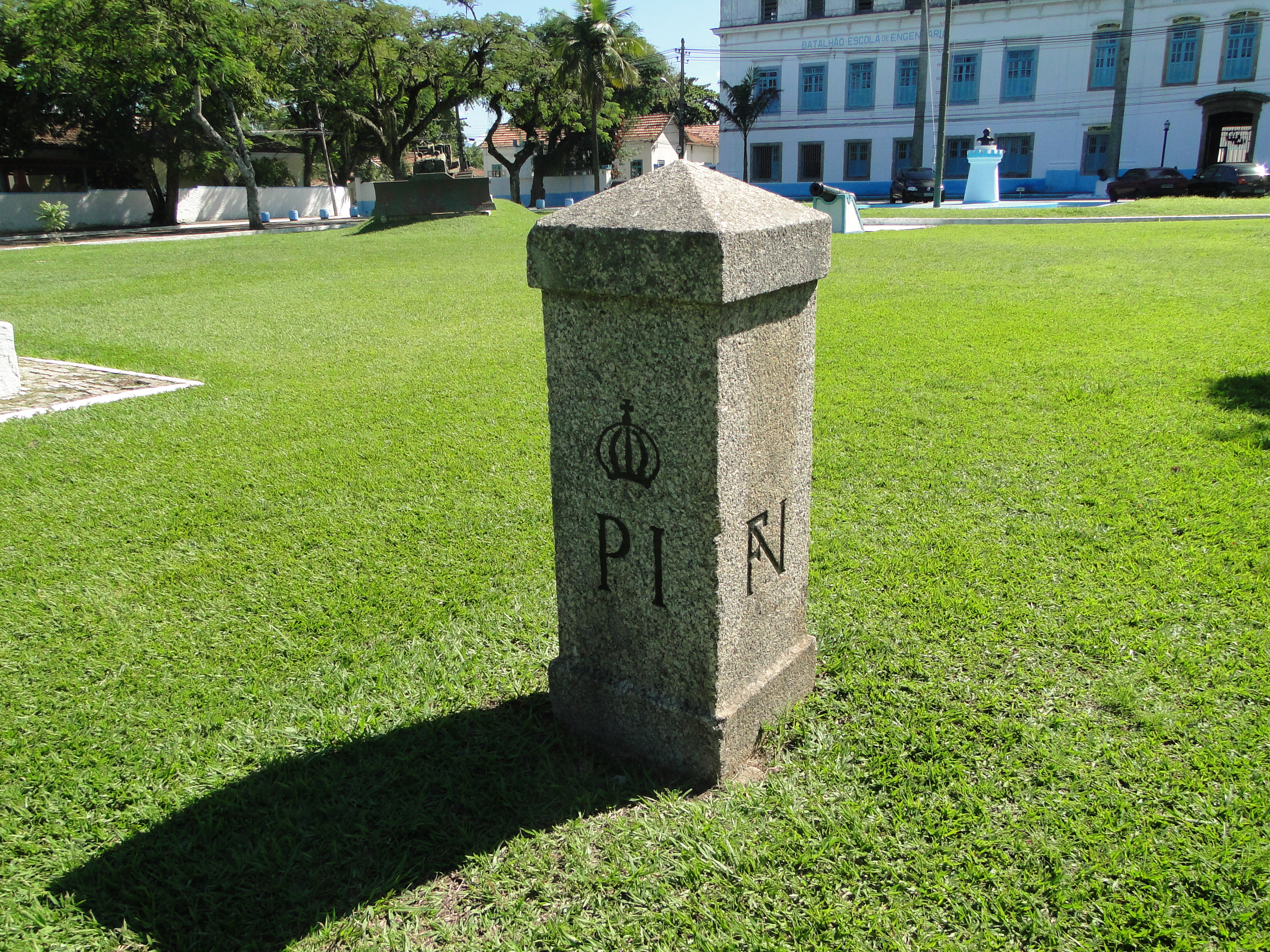 Marco Imperial, Santa Cruz, Rio de Janeiro-RJ